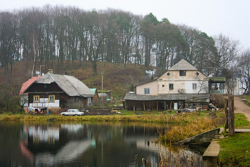 Pilaitės dvaras ir piliakalnis Pilaitė Manor and Hillfort